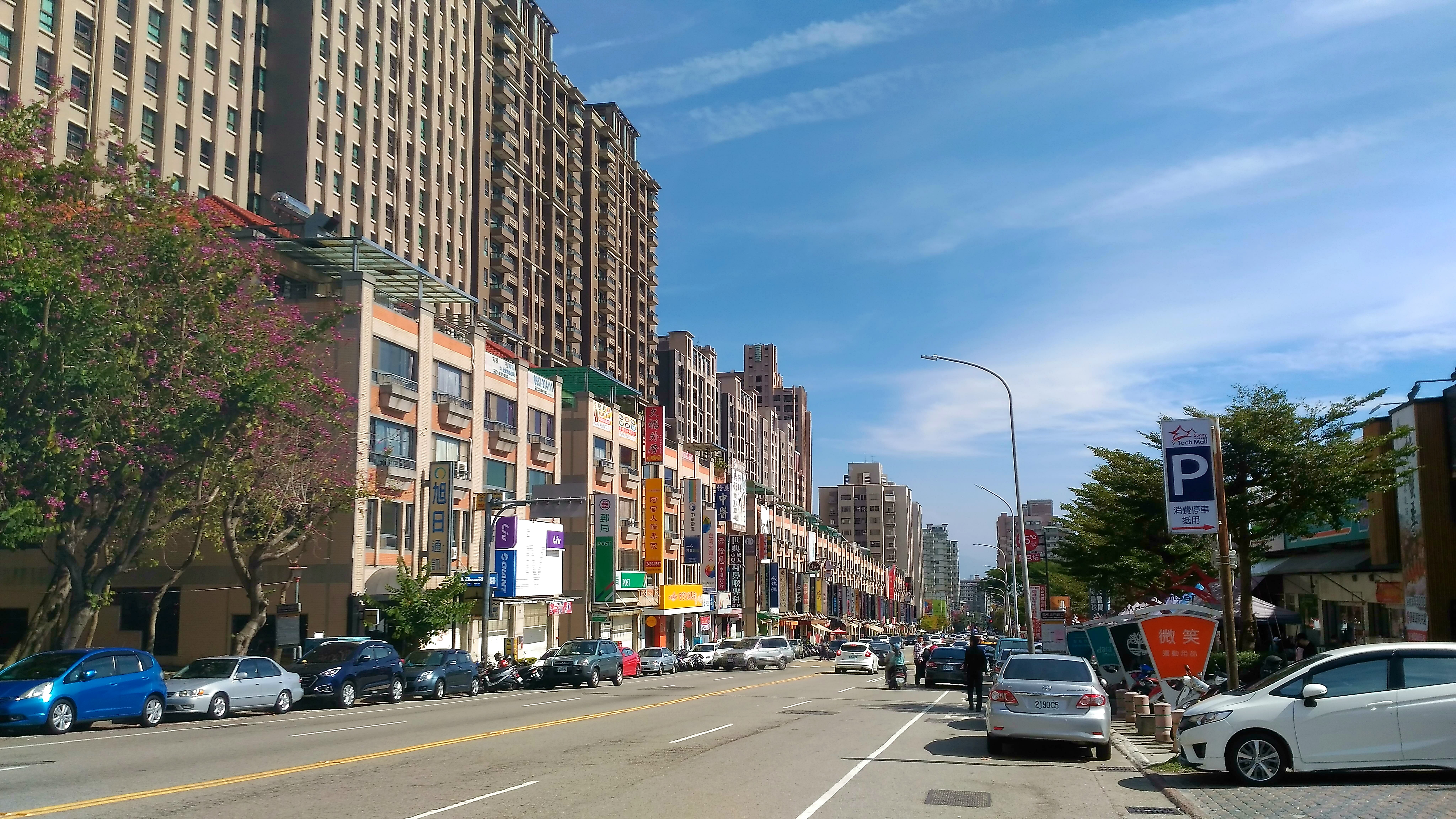 中文（台灣）: 西屯路上的中科商圈